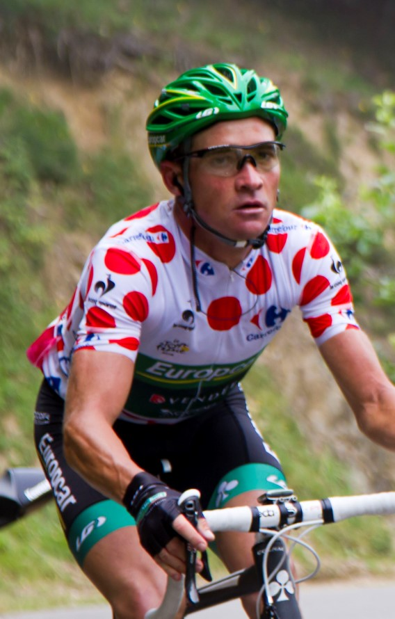 028 voeckler en kessiakof